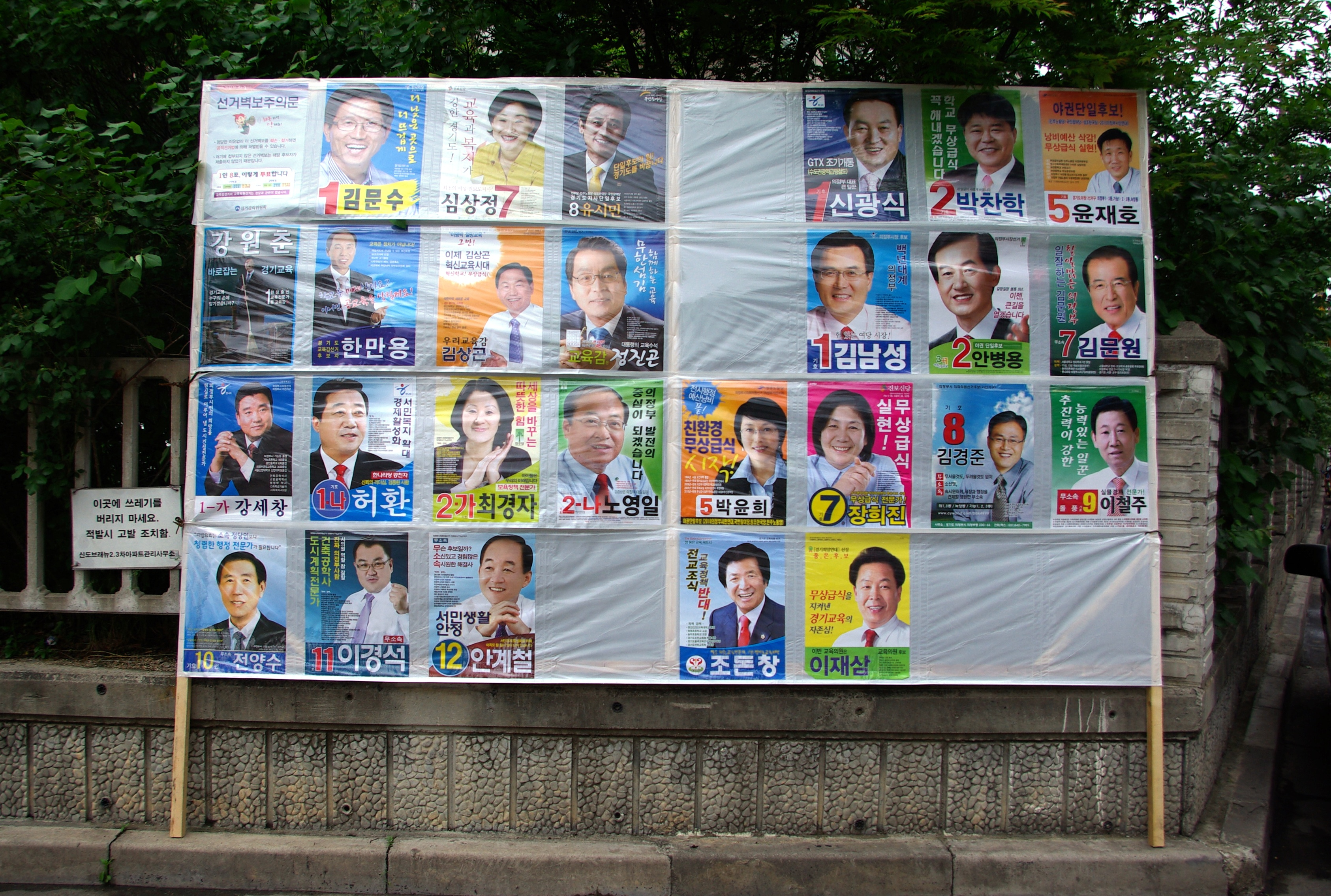 2010년 6월 2일에 치러진 제5회 지방 선거의 경기도 의정부시 선거구 포스터다.